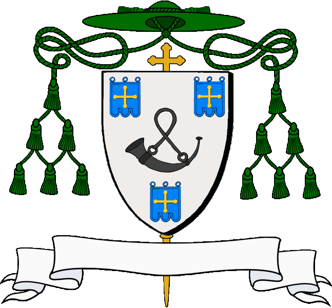 En arc'hant e hucher en sabel, heuliet gant tri banniel en glazur karget pep hini gant ur groazig avalouek en aour